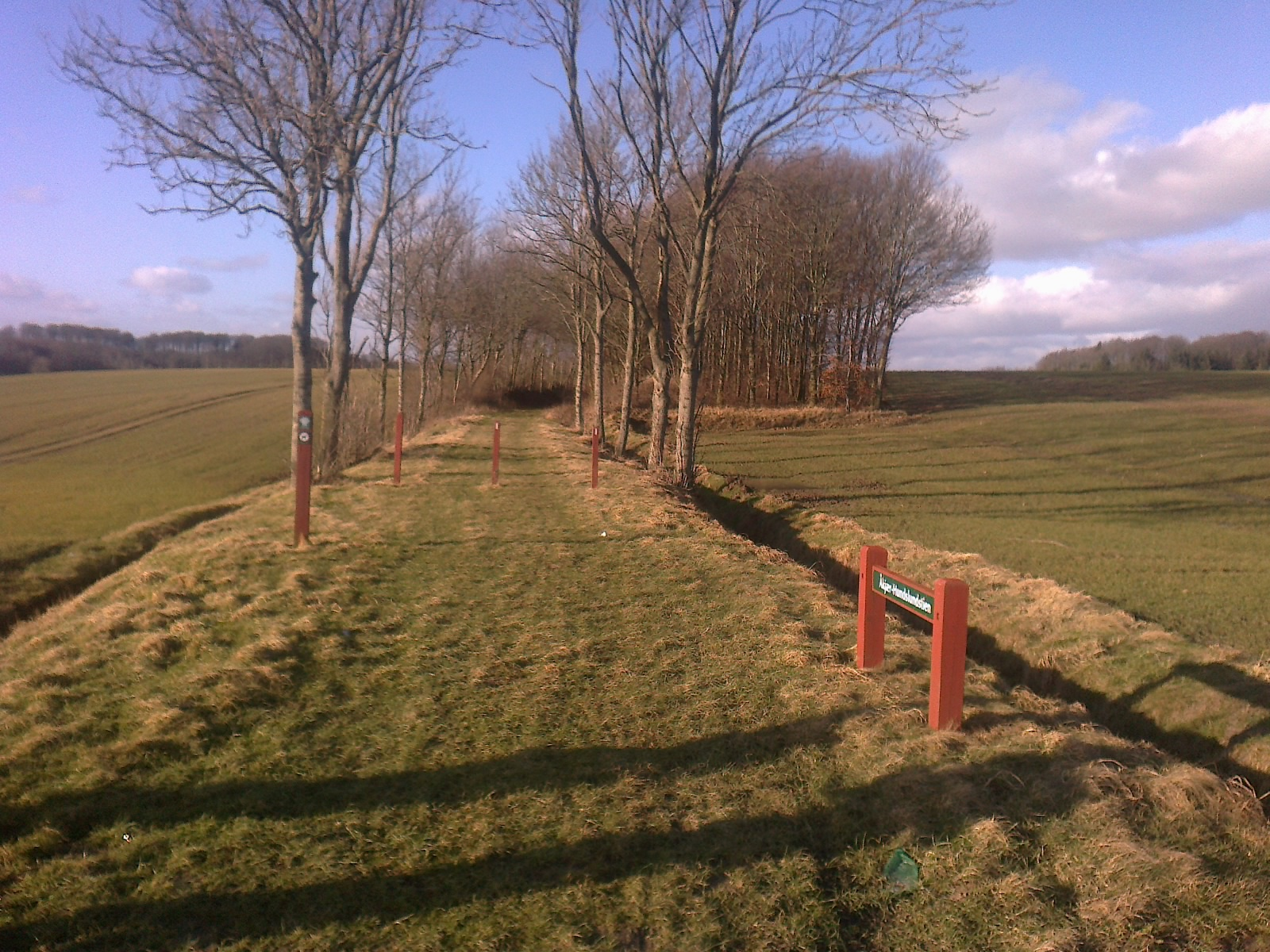 Hundslund-Åkjær natursti på Horsens-Odder banens tracé slutter ved Horsensvej - her lå Åkær trinbræt